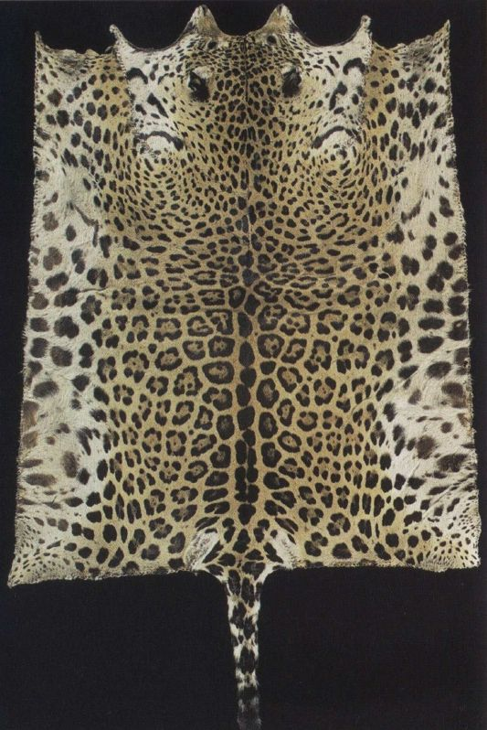 Jaguarfell. Objektbeschreibung: Eintrag historische Karteikarte: Decke aus Jaguarfell; innen mit roten Mustern. Eintrag im historischen Hauptkatalog: Decke aus Jaguarfell, bemalt Material/Technik: Jaguarfell Maße: Breite: 130 cm Länge: 210 cm (wo): Brasilien; Mato Grosso; Bororo (wer): Rohde, Richard (Sammler) Verwandtes Objekt/Literatur: Vorgang E 40/1885 Standort: Berlin Inventarnummer: V B 1324 Rechteinformation: Ethnologisches Museum, Staatliche Museen zu Berlin Rechtsstatus: Namensnennung - Nicht-kommerziell - Weitergabe unter gleichen Bedingungen